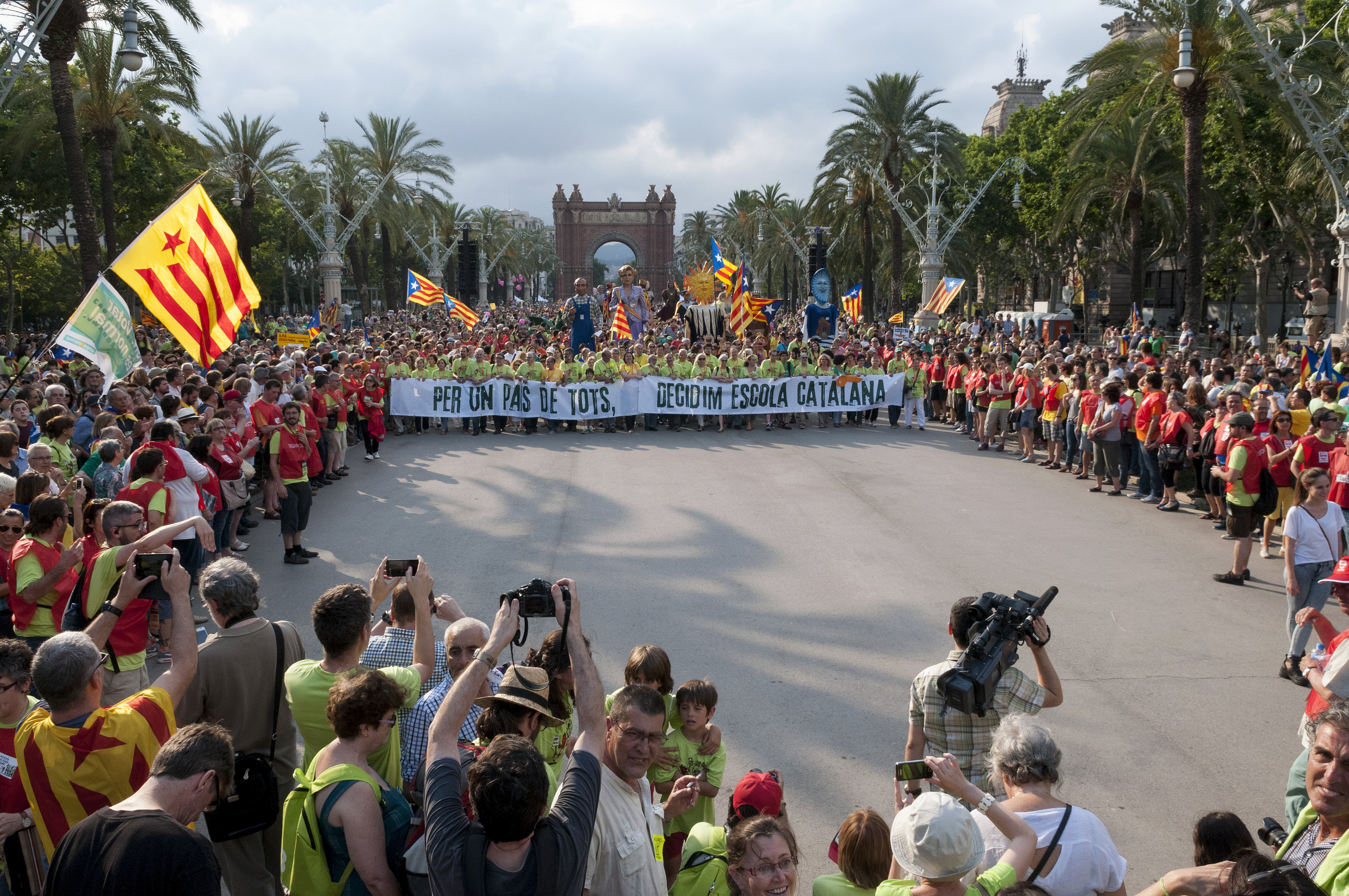 Mobilització per l'escola catalana i el dret a decidir el model educatiu al centre de Barcelona. 14.6.2014.